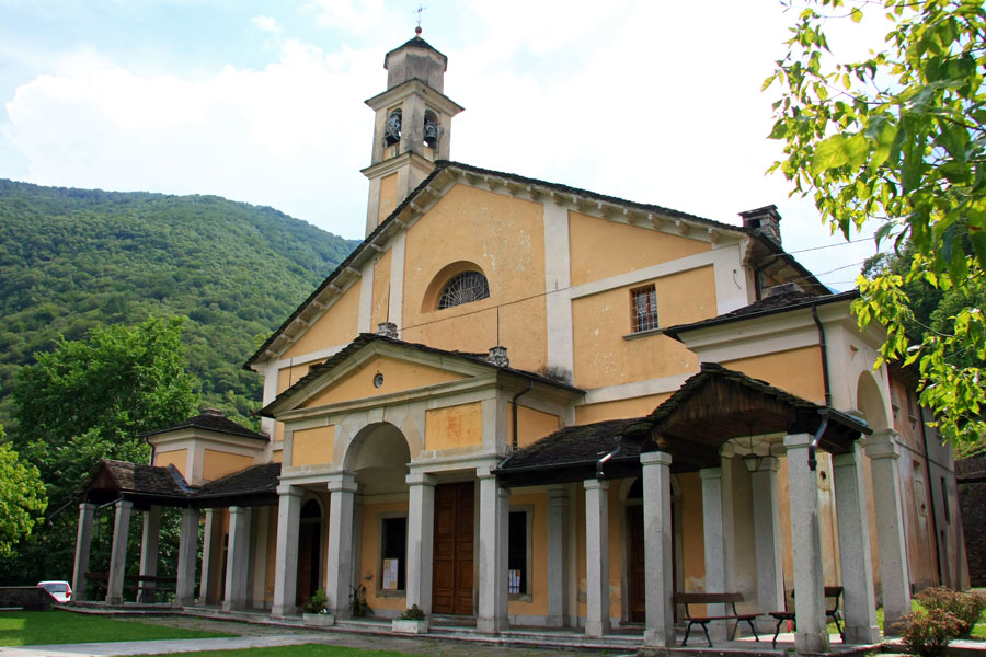 Il Santuario della Madonna del Boden ad Ornavasso (VB)